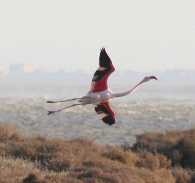 Vol de flamant sur Bages